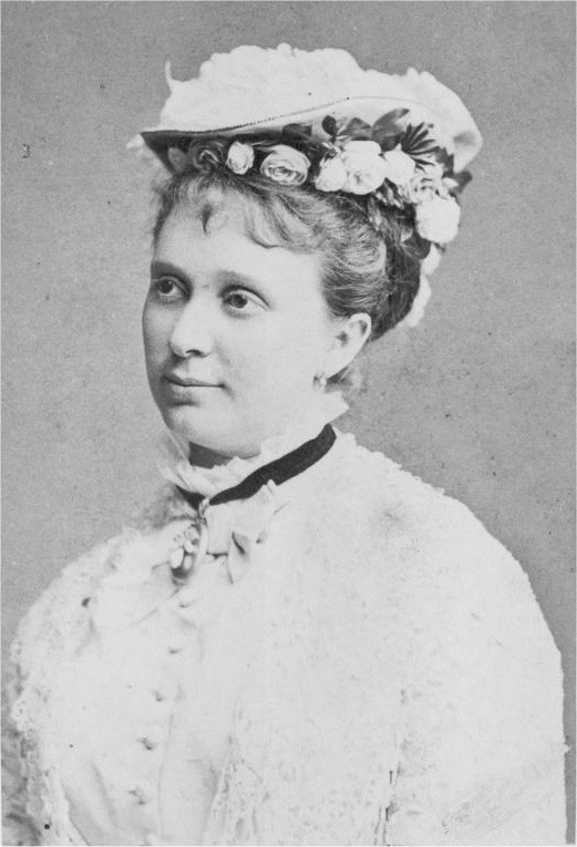 Mathilde Mallinger (1847-1920), österreichische Opernsängerin (Sopran)